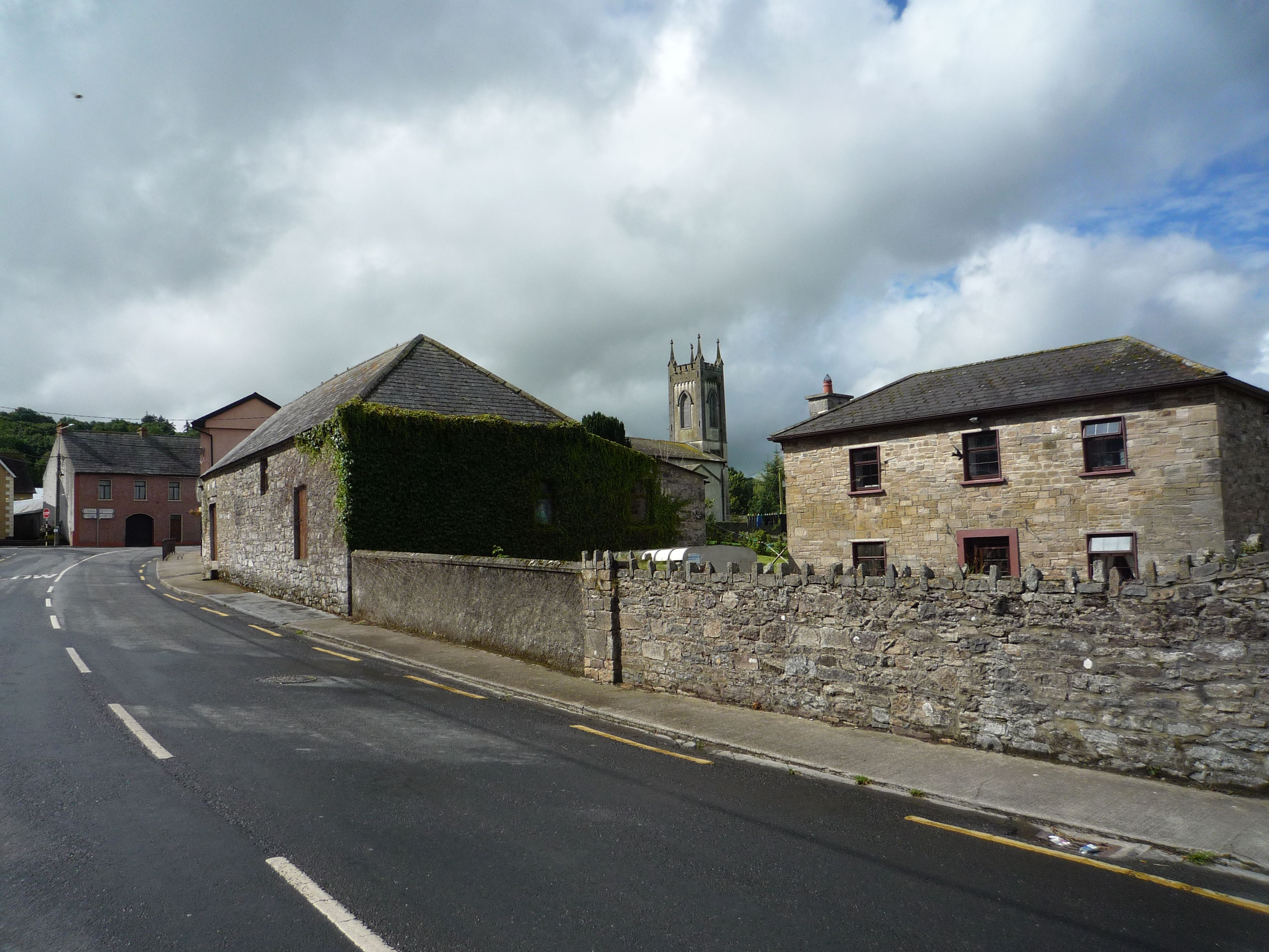 20120812 05 Ireland - Co. Kilkenny - Kilmoganny